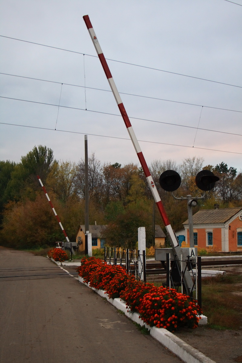 Переїзд на станції Богданівка. Яготинський район, Київська область